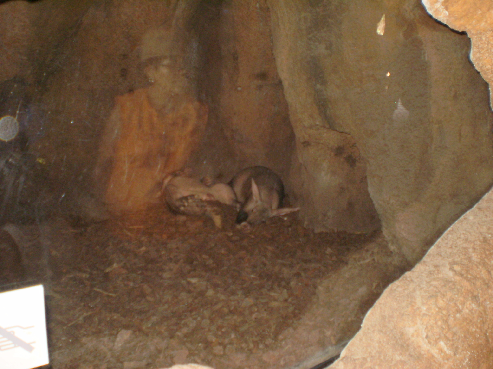 Bioparc Oricteropodo durmiendo debido al calor de verano